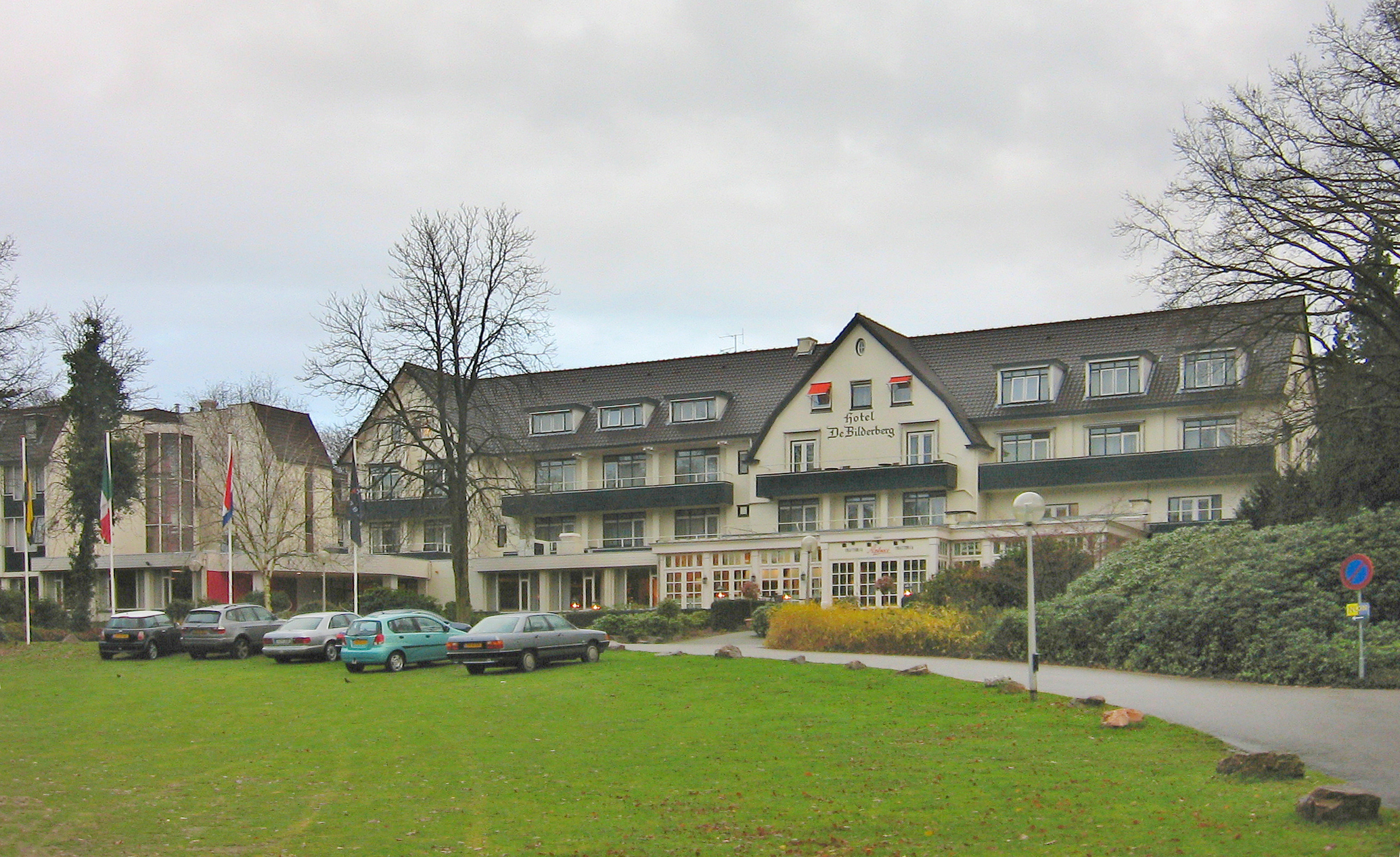 Bilderberg, Oosterbeek, THE NETHERLANDS